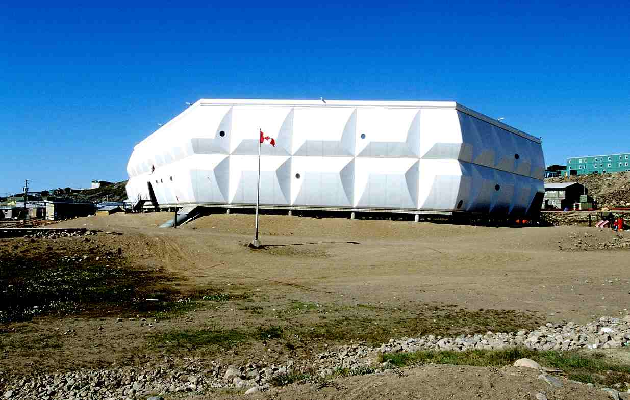 Nakasuk School in Iqaluit, Nunavut, Canada